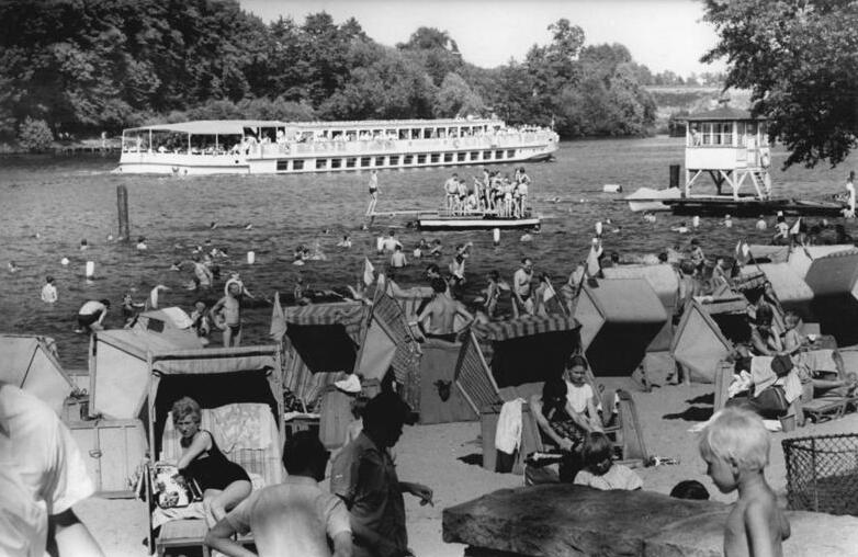 Zentralbild-Junge-27-6-70-sche-Berlin: Hitze-Wasser-Erholung- Die gegenwärtigen Temperaturen lockten mehr als 7500 Hauptstädter in die 22 Grad warmen "Fluten" des Strandbades Oberspree. Strandkörbe, Liegestühle und Campingliegen fanden schnell ihre erholungsuchenden Benutzer."